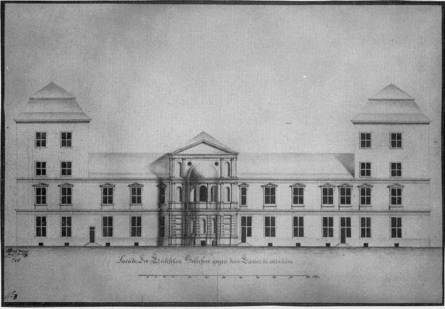 Ostflügel des Jülicher Schlosses 1748 Sonstiges